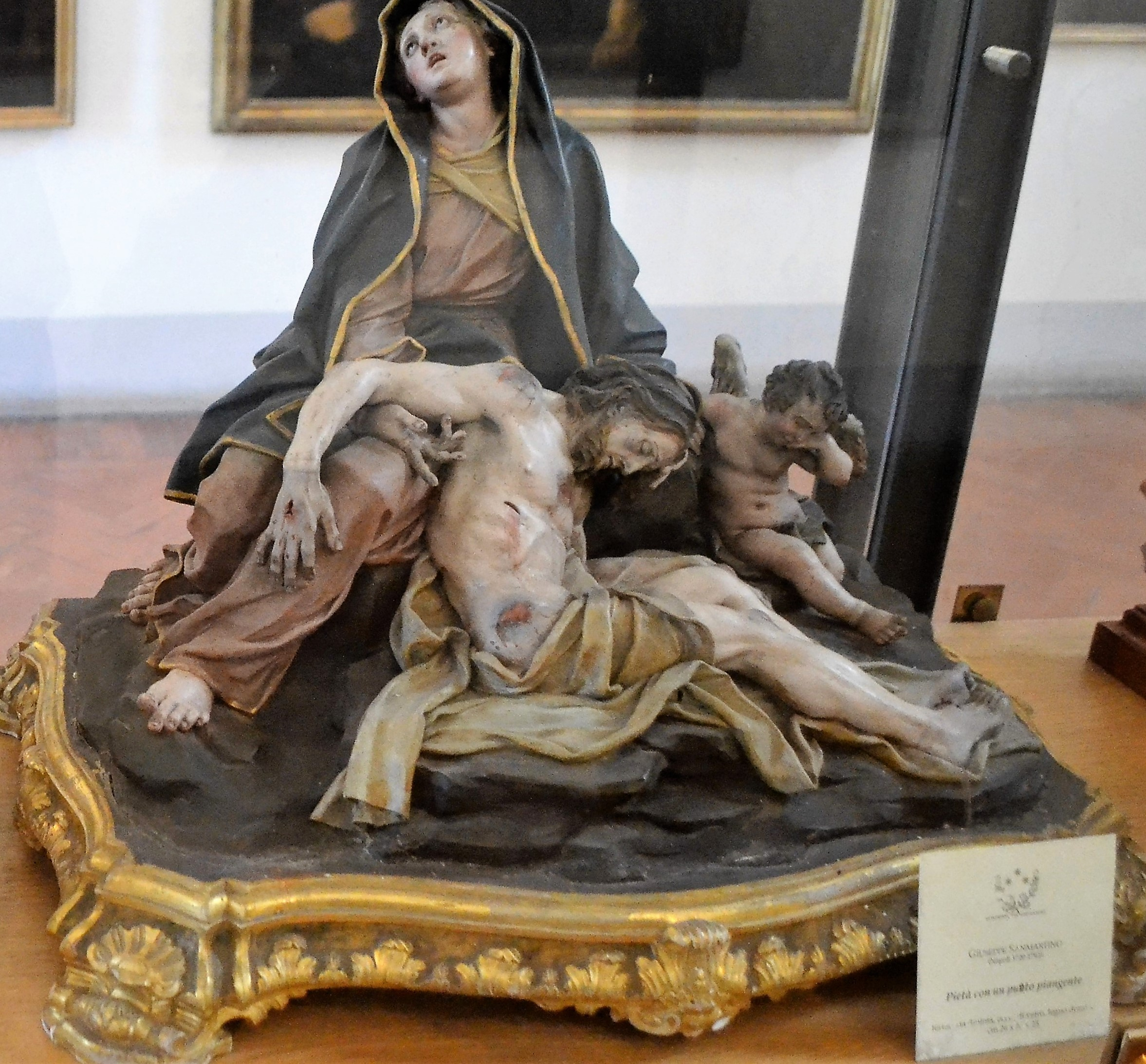 Pietà con putto piangente di Giuseppe Sanmartino - Quadreria dei Girolamini di Napoli